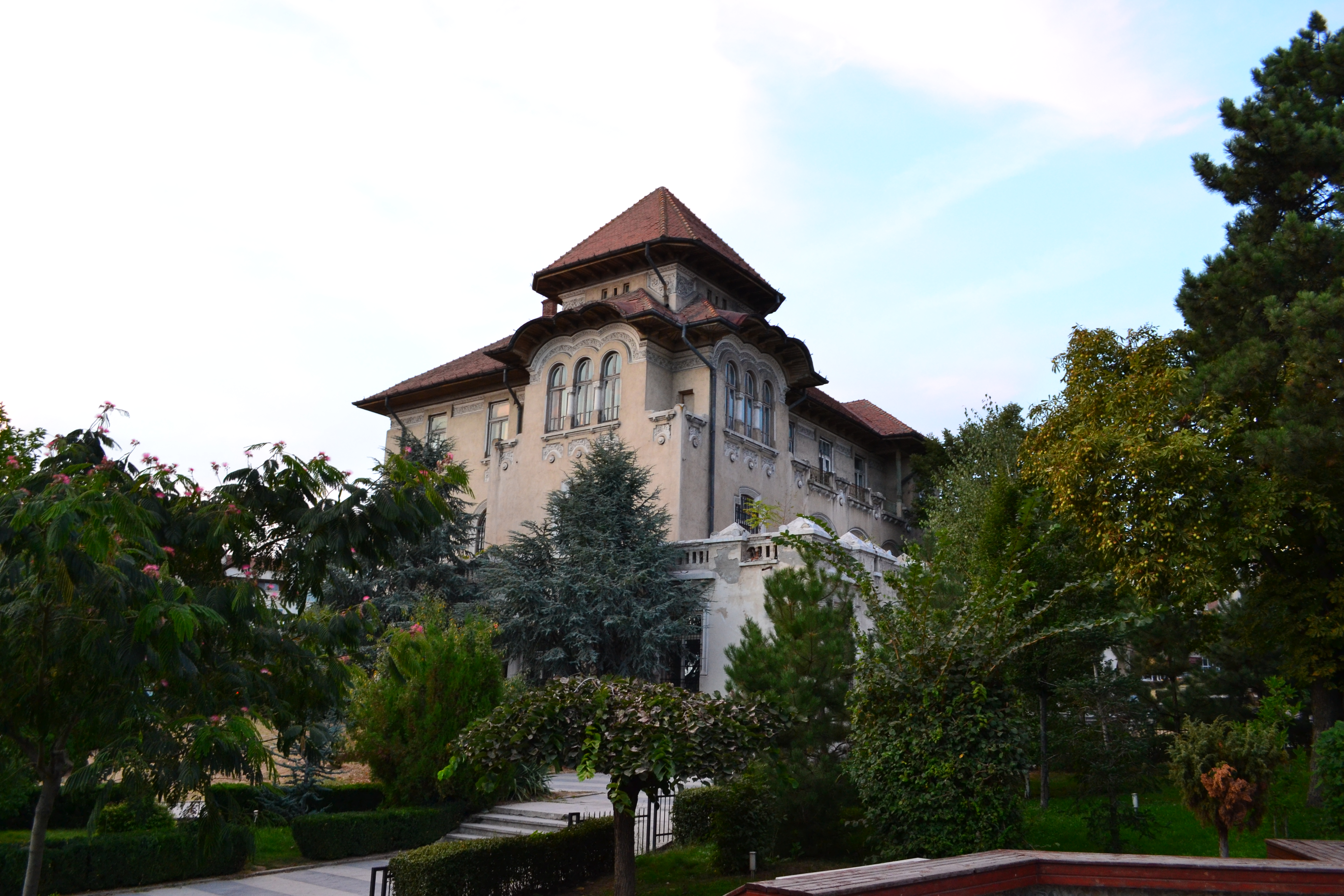 Banca Nationala a Romaniei din Slatina